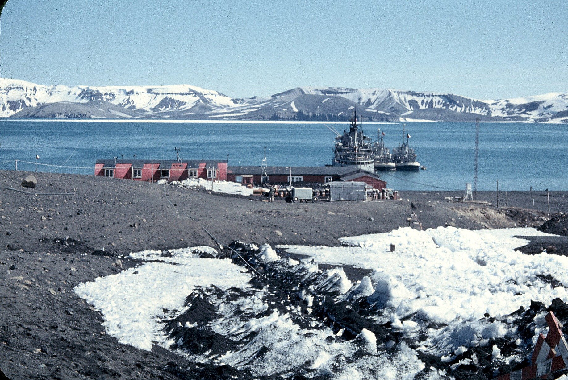 El Lientur junto al Angamos y el Lautaro, acoderados en caleta Péndulo, bahía Foster, isla Decepción. Enero 1958